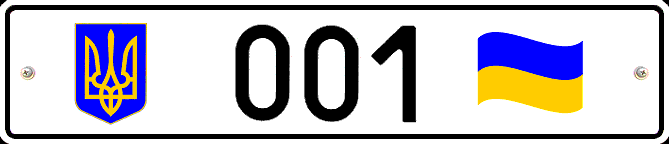 Номерний знак України